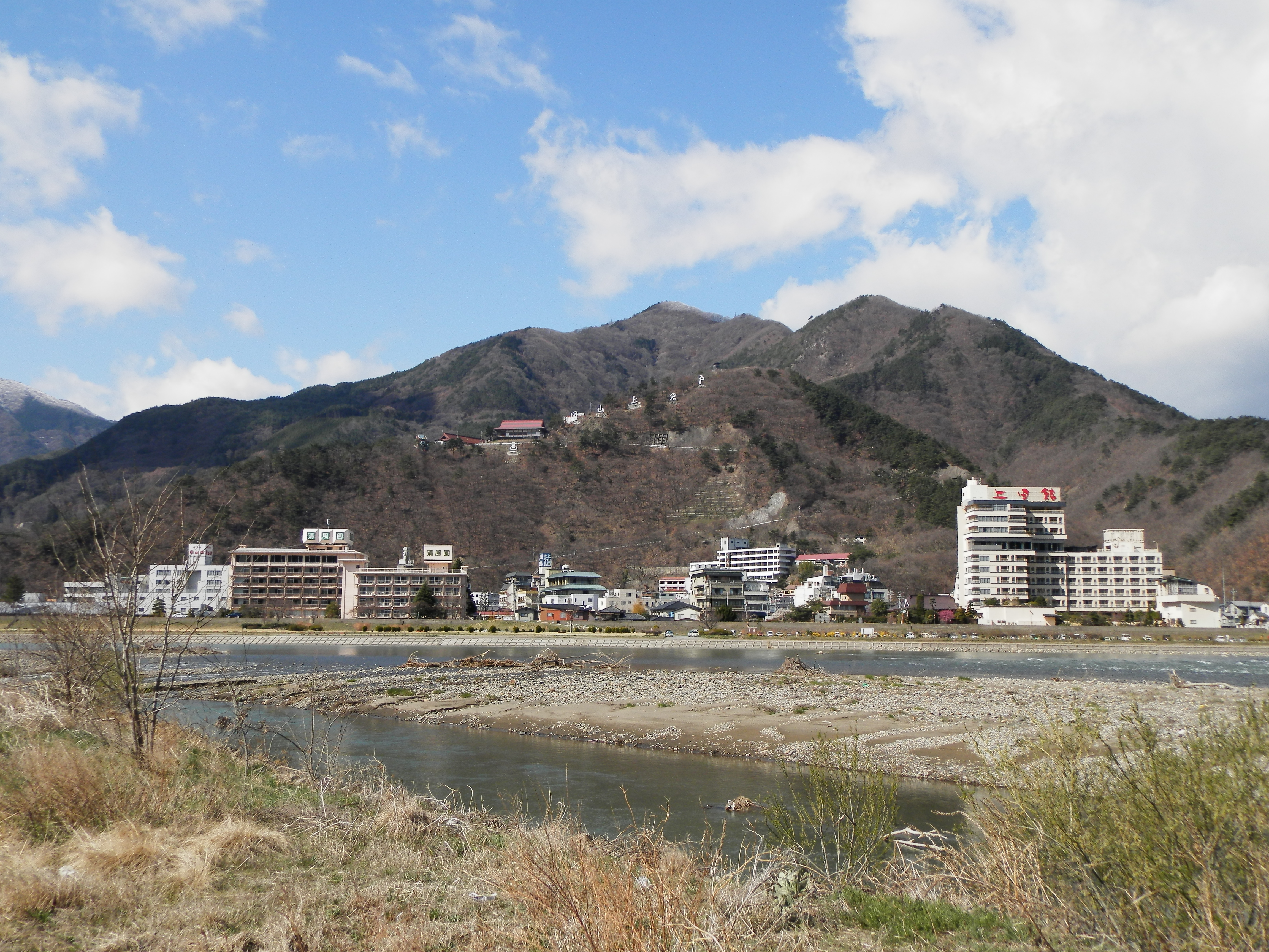 戸倉上山田温泉と千曲川。